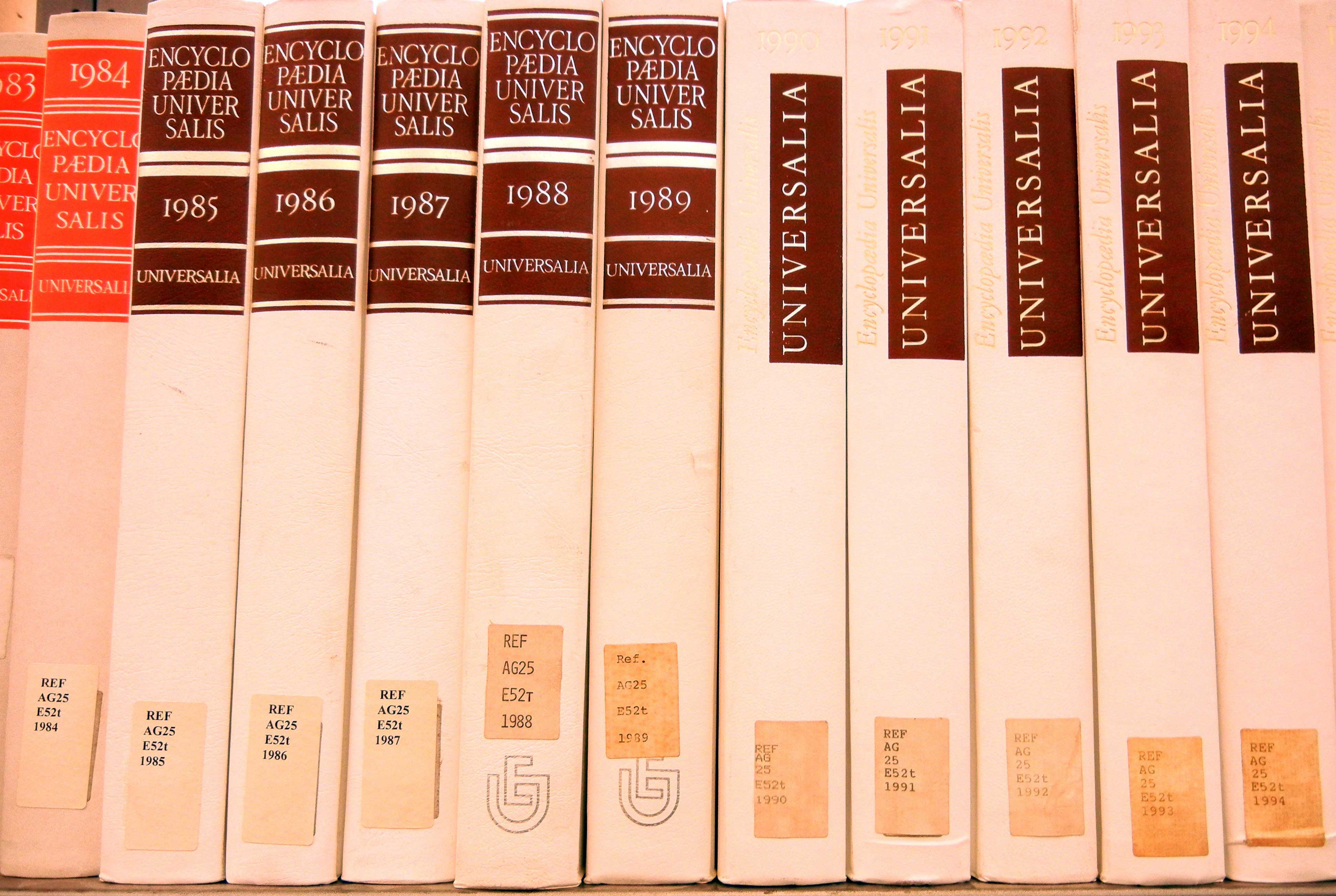 Série de volumes de suppléments